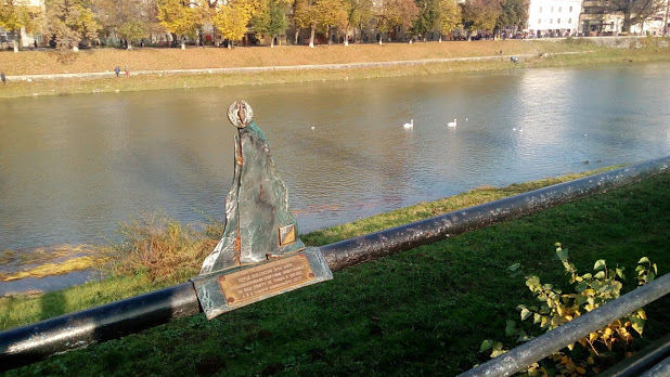 Пам'ятний знак в честь перших змагань зі спортивного орієнтування в Україні, які пройшли поблизу міста Ужгород. Встановлено в Ужгороді, Київська набережна